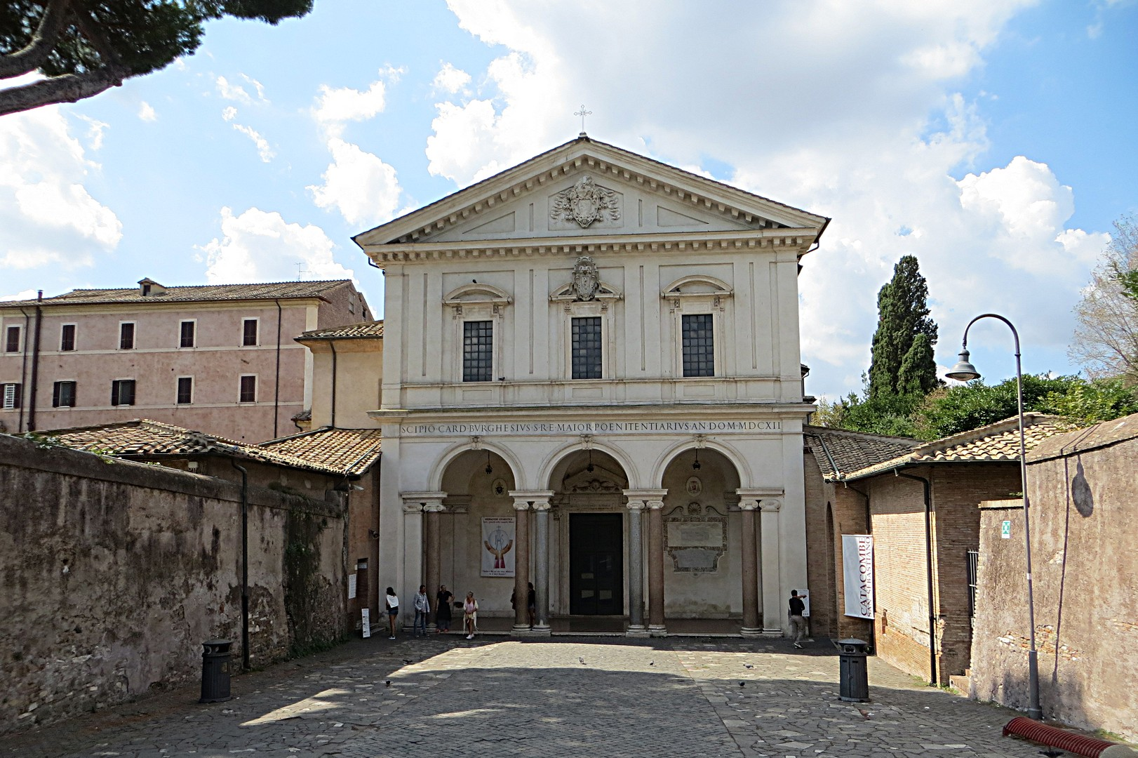 Catacombe di San Sebastiano